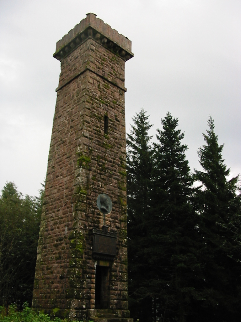 Commune de Urbeis (Bas-Rhin) : tour bâtie au sommet du Climont.